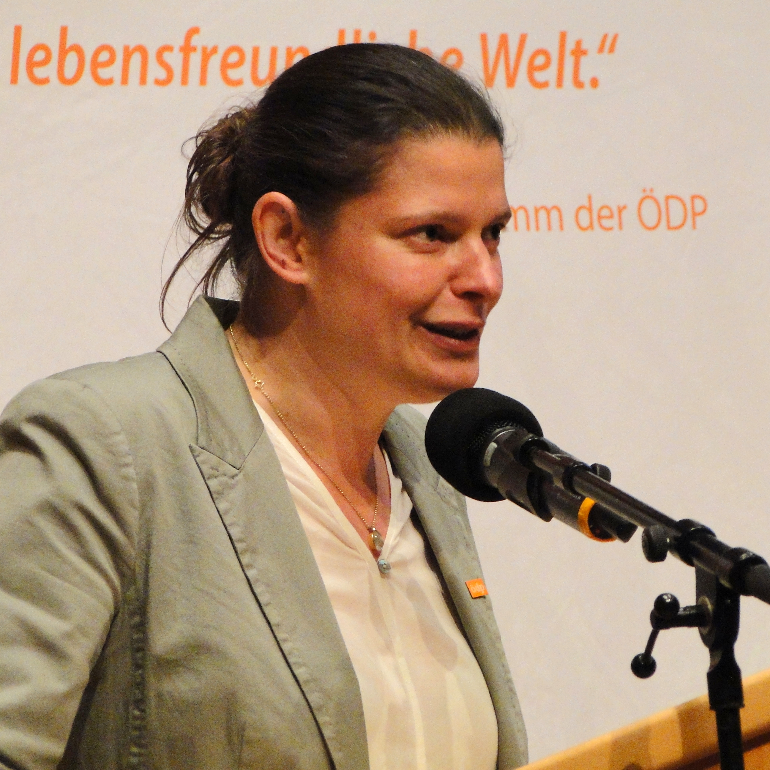 Agnes Becker beim 56. Bundesparteitag der ÖDP am 7. April 2019 in Hof